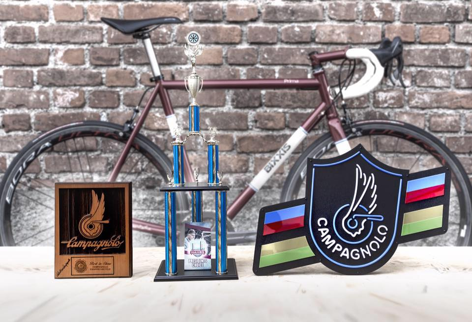 BIXXIS PRIMA 2016NAHBS受賞